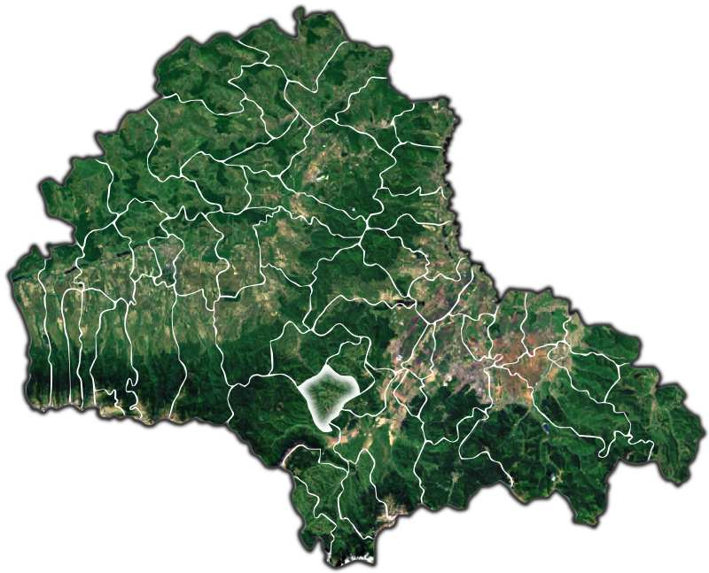 Poiana Marului jud Brasov